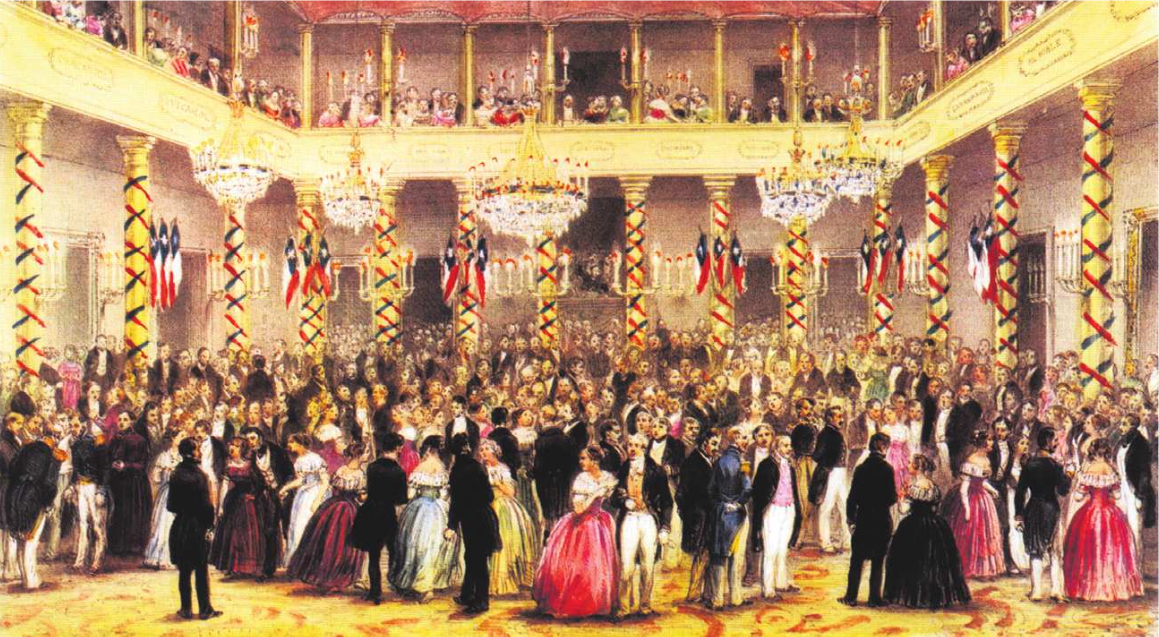 Un baile en la casa de gobierno de Chile, un 18 de septiembre.